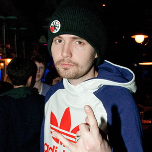 Диджей Noise MC на праздновании 15-летия программы News Блок на MTV Россия